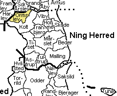 Kort der viser Ormslev Sogn, Ning Herred, Århus Amt, Denmark.